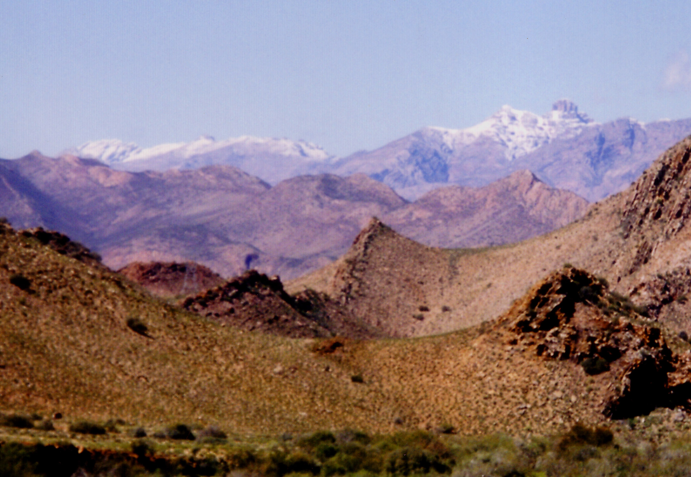 Taken by myself, Andres de Wet, September 2001